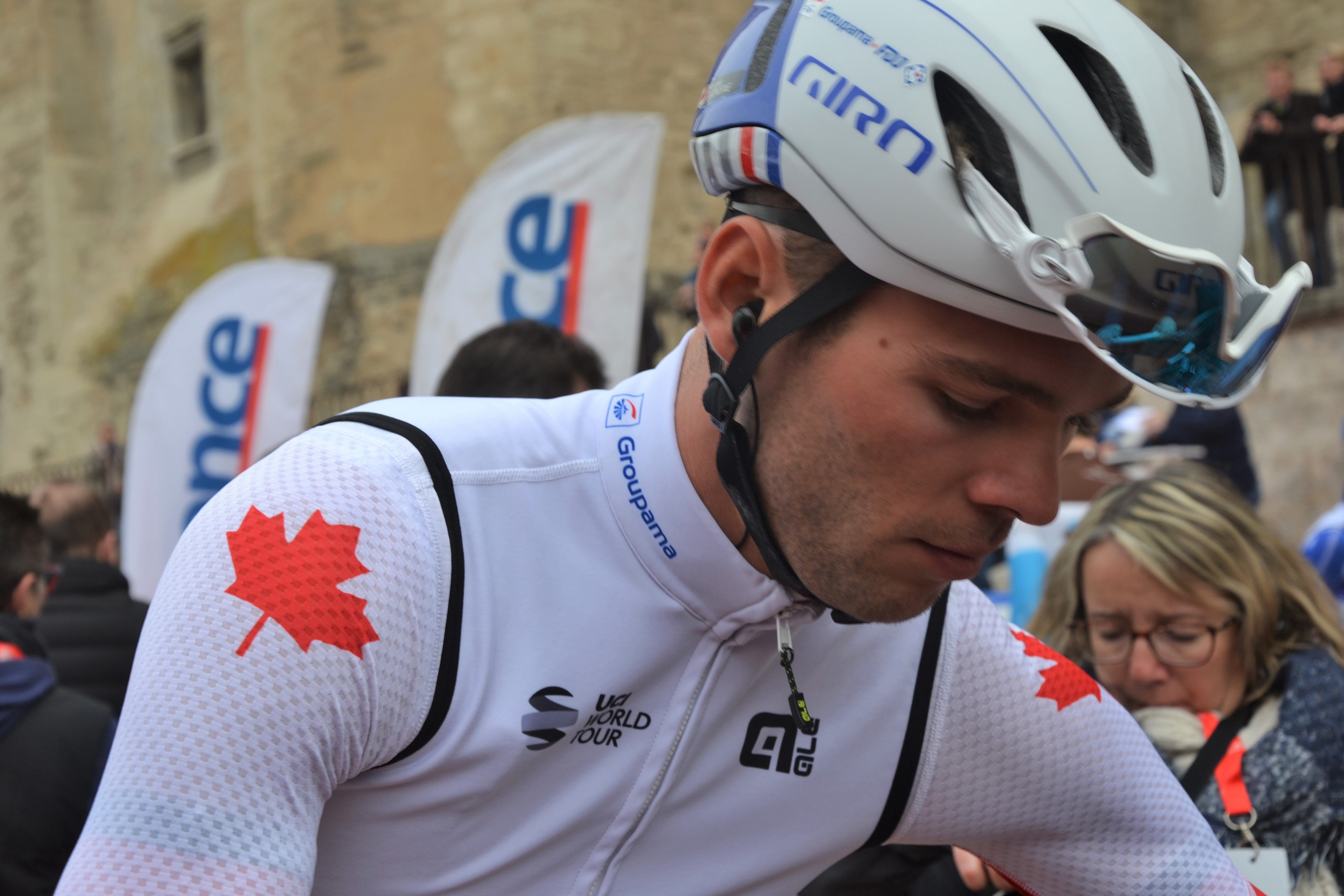 Lors du podium des signatures avant départ de l'étape